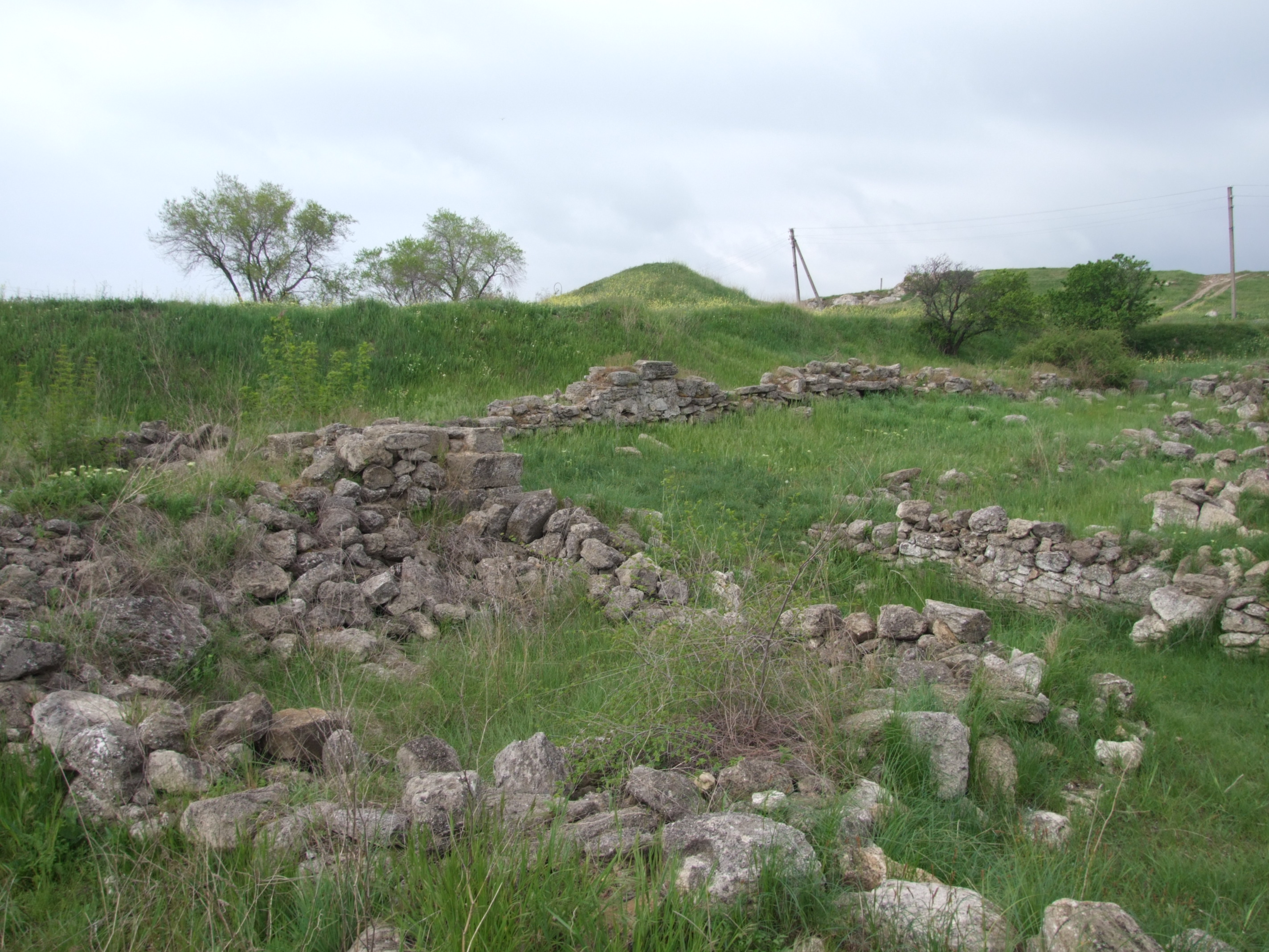 Археологічний комплекс «Стародавнє місто Мірмекій»